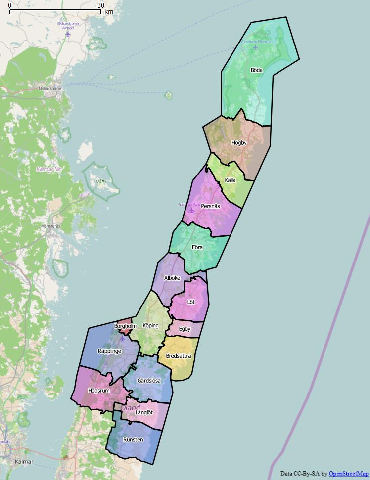 Distriktsindelningen i Borgholms kommun